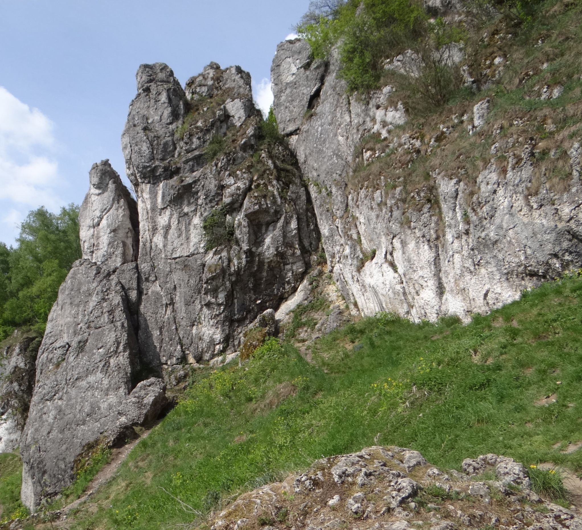 Zjazdowa Turnia w w Dolinie Kobylańskiej